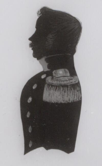 Jan Willem Cornelis van Ittersum (18033-1880)